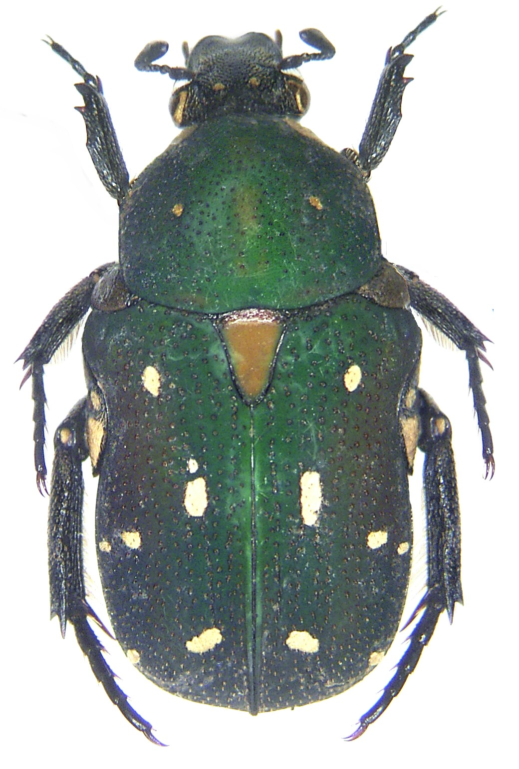 Familie: Scarabaeidae Grösse: 11-12 mm Fundort: Indonesien, Molukken, Bacan, Labuha leg. det. A.Skale, 2006 Foto: U.Schmidt, 2006